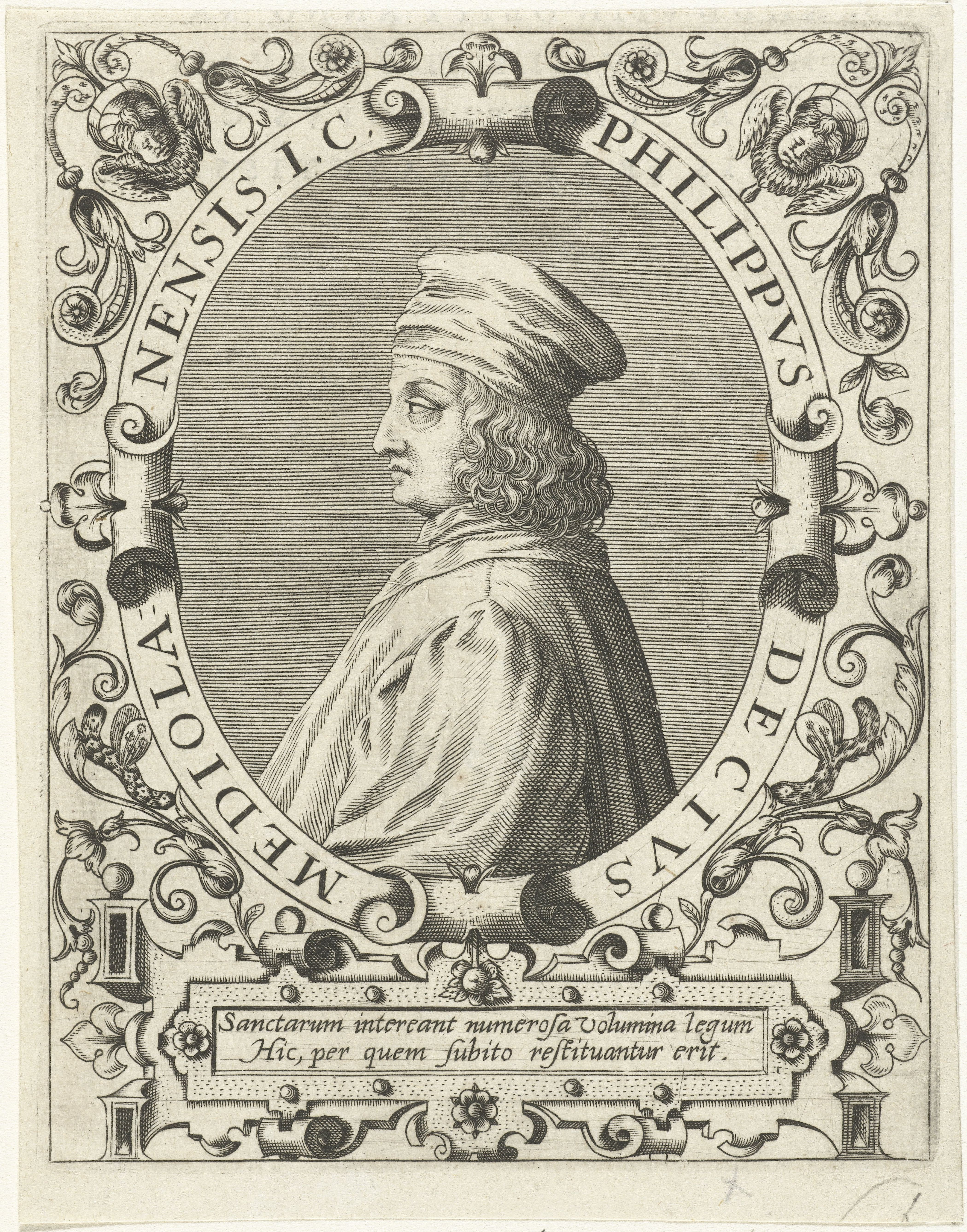 IdentificatieTitel(s): Portret van Filippo DecioPhilippus Decius (titel op object)Objecttype: prent boekillustratie Objectnummer: RP-P-1909-4318Catalogusreferentie: Singer 18372Opschriften / Merken: verzamelaarsmerk, verso, gestempeld: Lugt 2228Omschrijving: Portret van de Italiaanse rechtsgeleerde Filippo Decio, in ovaal met randschrift. Onder het portret een cartouche met een Latijns vers.VervaardigingVervaardiger: prentmaker: Theodor de Brynaar ontwerp van: Jean Jacques Boissard (mogelijk)Plaats vervaardiging: Frankfurt am MainDatering: ca. 1597 - ca. 1599 en/of 1669Fysieke kenmerken: gravureMateriaal: papier Techniek: graveren (drukprocedé)Afmetingen: plaatrand: h 140 mm × b 100 mmToelichtingGemaakt voor: J.J. Boissard, Icones virorum illustrium doctrina &c eruditione praestanti um contines. Frankfurt am Main: de Bry, 1597-1599. Opnieuw gebruikt in: J.J.Boissard, Bibliotheca chalcographica, hoc est Virtute et eruditione clarorum Virorum Imagines. Heidelberg: Clemens Ammon, 1669. Dl. 1-5 (te herkennen aan de toegevoegde signatuur in de rechter onderhoek: 2F4).OnderwerpWie: Filippo DecioVerwerving en rechtenVerwerving: aankoop 1905Copyright: Publiek domein